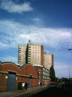 Grimsby. Bân-lâm-gú: Grimsby, North East Lincolnshire ê chi̍t-ê siâⁿ-tìn.